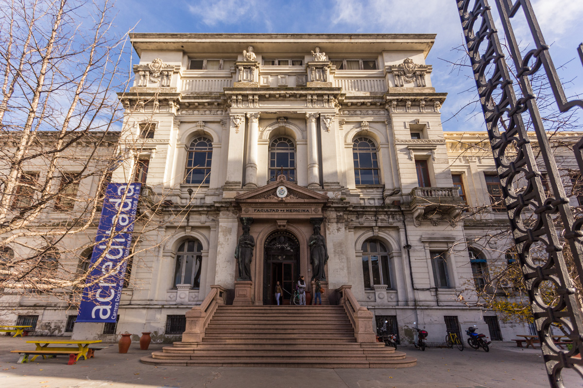 Facultad de Medicina de la Udelar. Ubicada en el departamento de Montevideo, Uruguay.